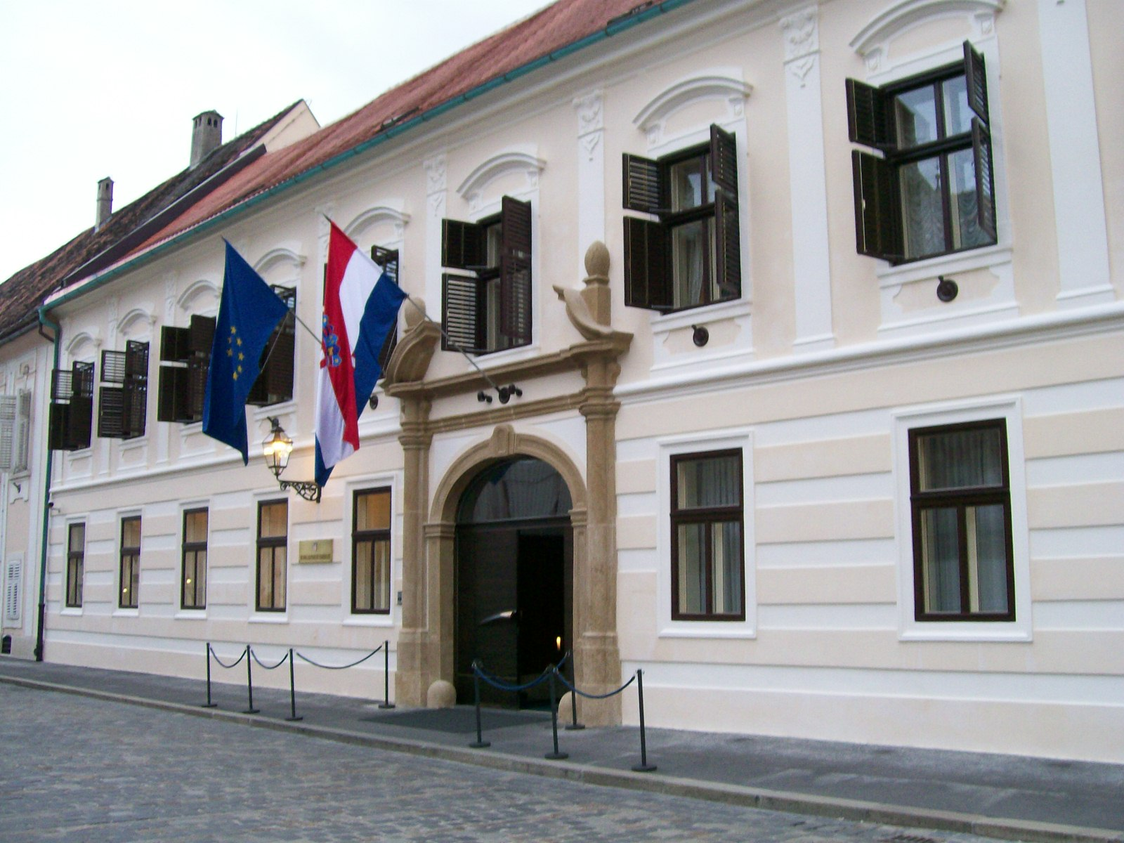 Vlada Republike Hrvatske